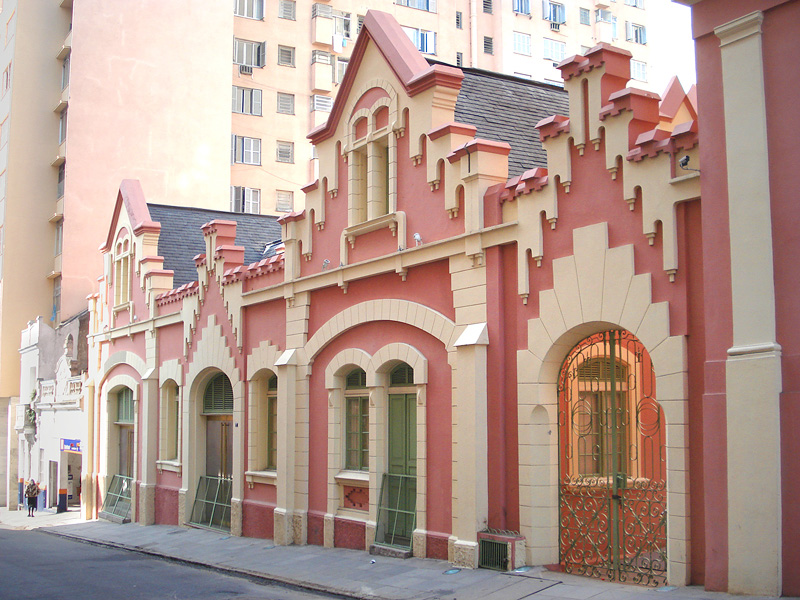 Antigas cavalariças do Palácio do Ministério Público, Porto Alegre, Brasil.